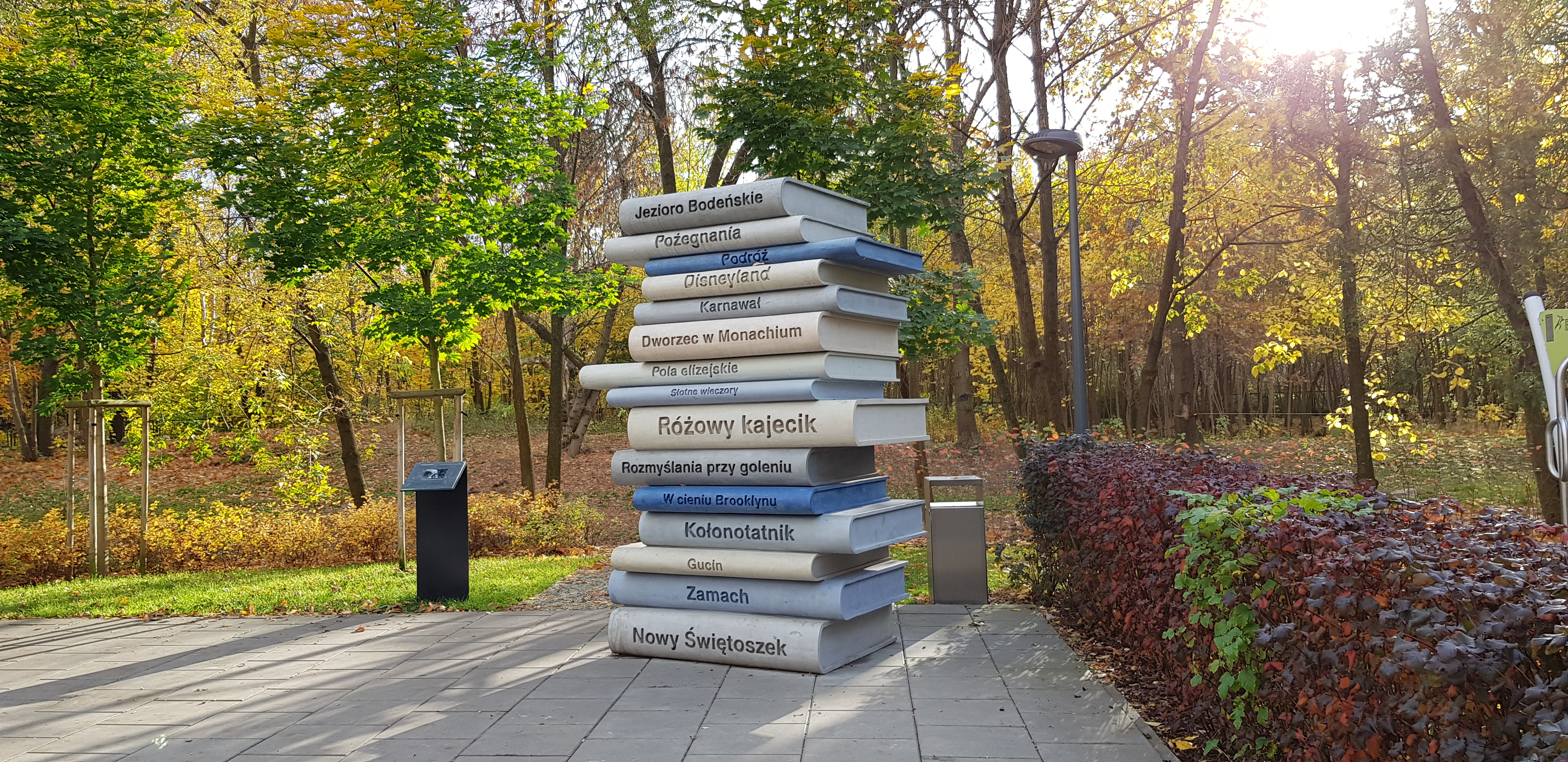 "Księgozbiór" - rzeźba Katarzyny Górnej na Żoliborzu Artystycznym